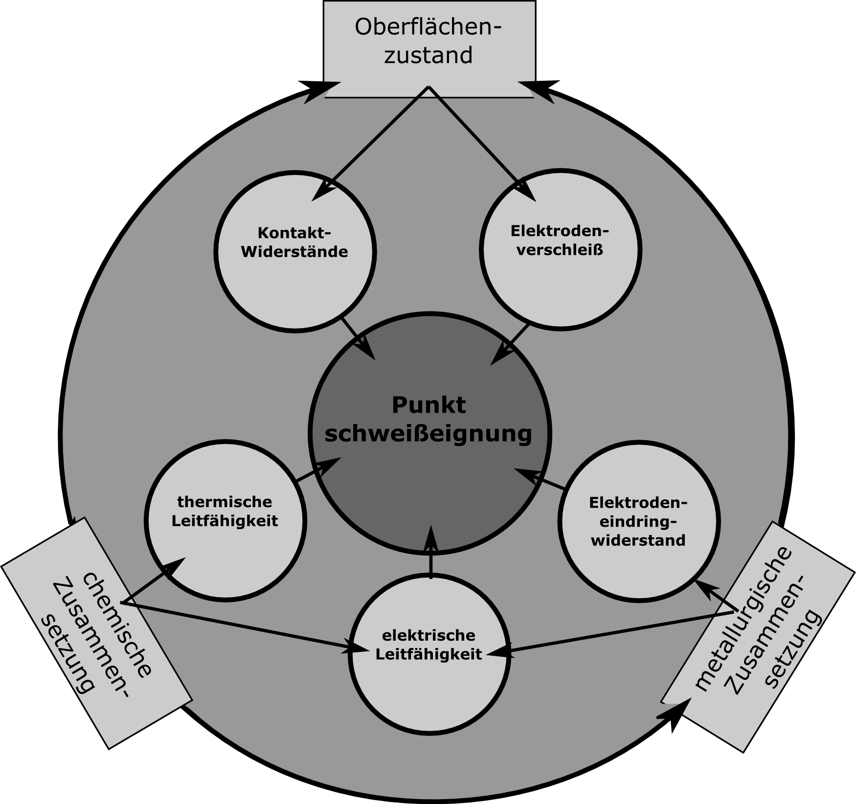 Einflussfaktoren auf die Eignung eines Werkstoffs zum Widerstandspunktschweißen nach B. Leuschen